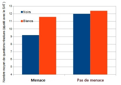 Illustration de la menace du stéréotype mise en avant par Steele et Aronson: les performances intellectuelles des Américains noirs sont inférieurs à celles des blancs lorsque le test est annoncé comme diagnostique. Par contre, les scores sont égaux (à condition que le score soit corrigé à l'aide du SAT) lorsque le test n'est pas diagnostique.